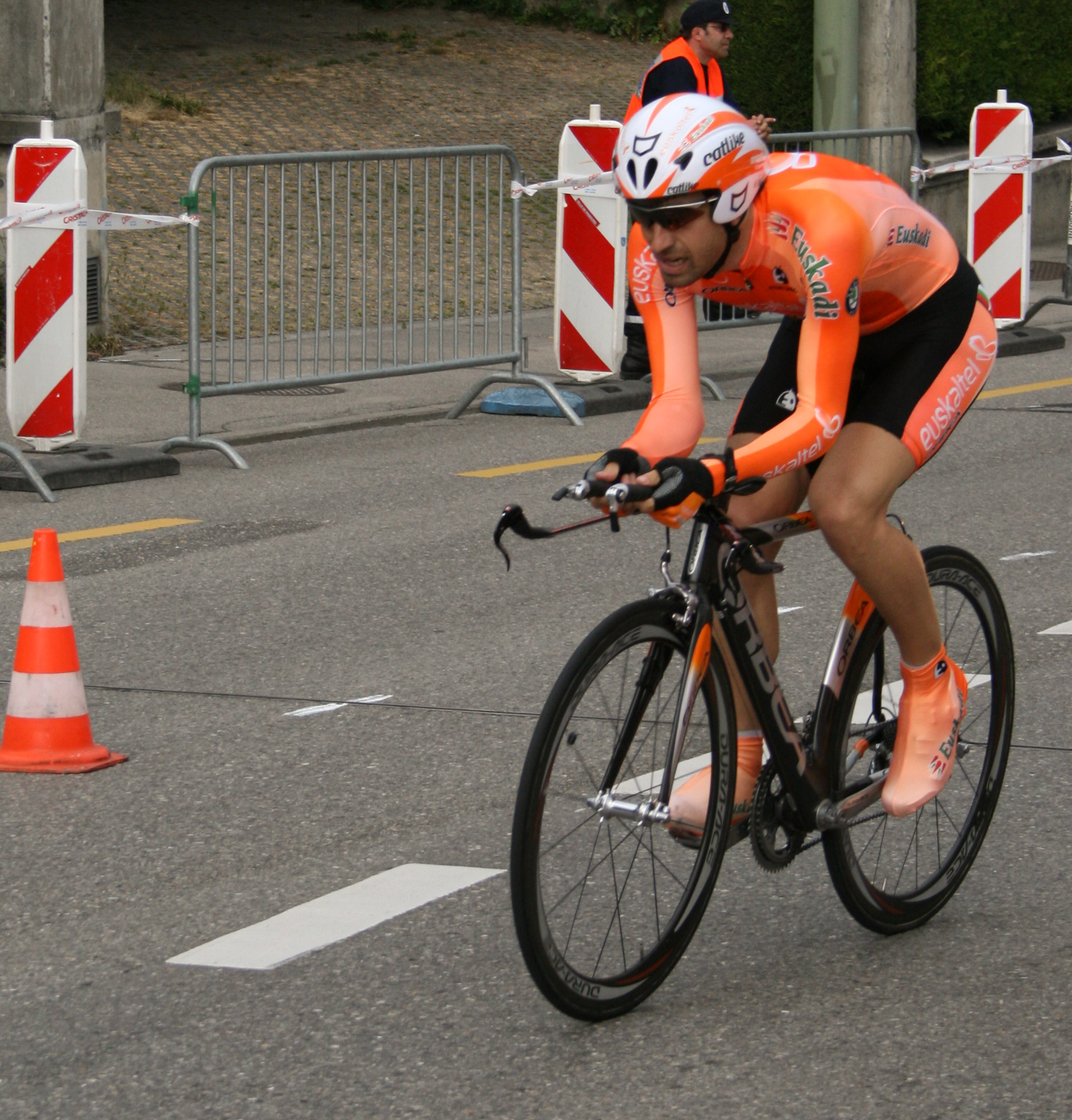 Inigo Landaluze prologue du Tour de Romandie 2007